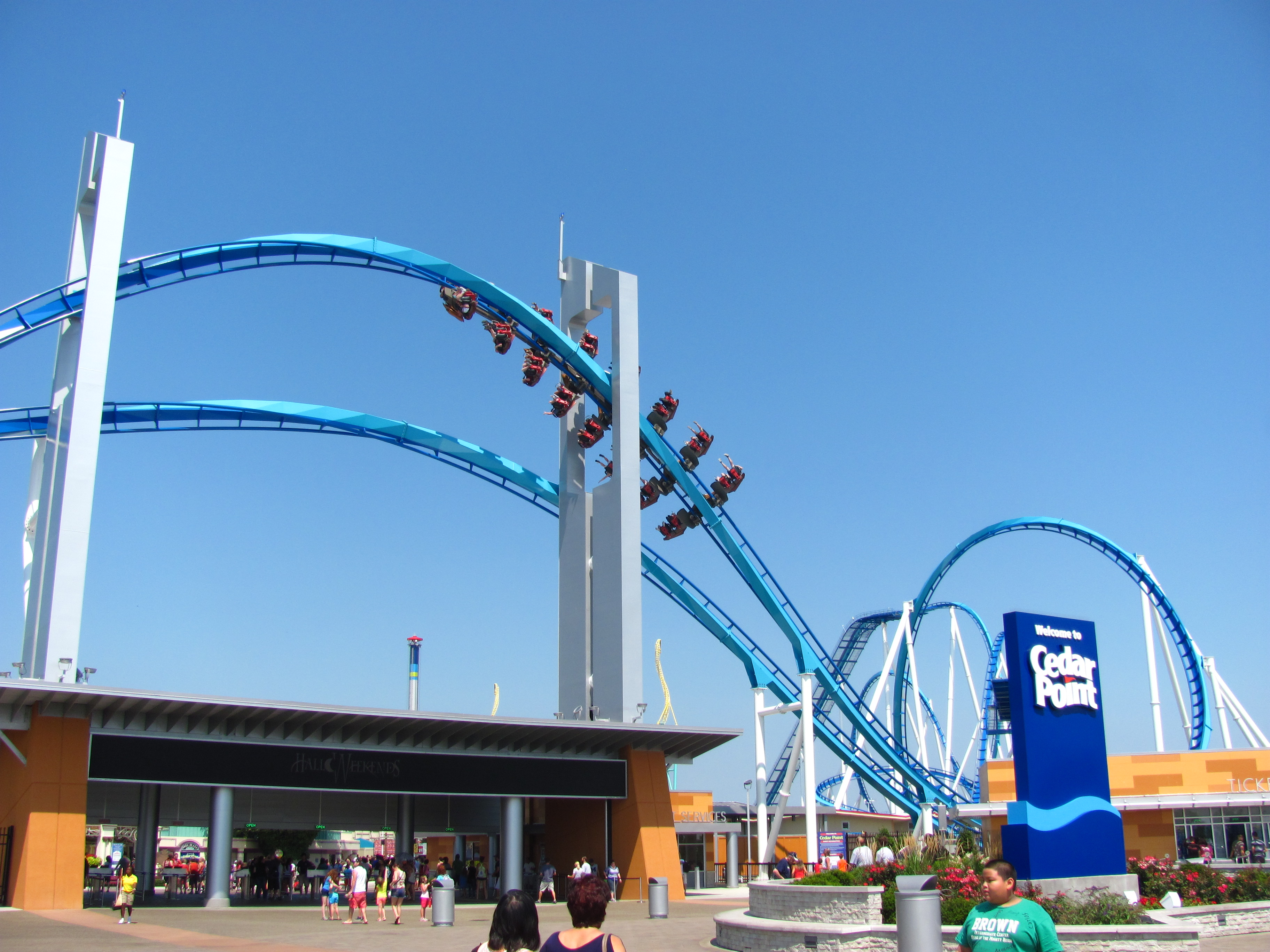 Cedar Point 016